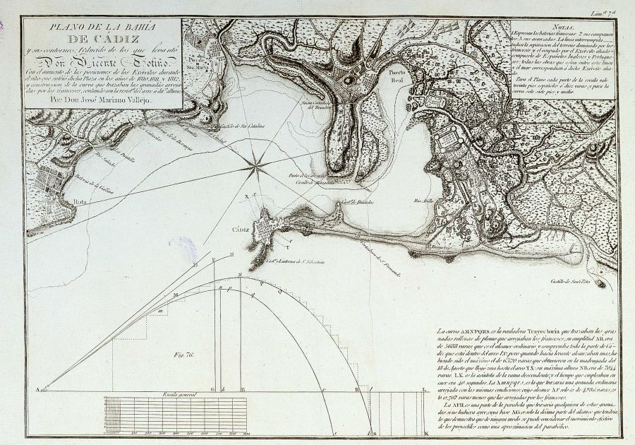 Sitio de Cádiz, entre 1810 y 1812.